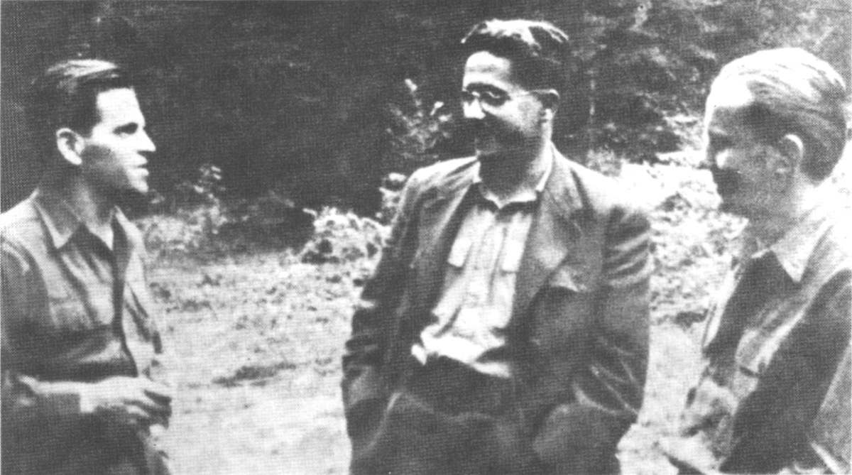 Srpskohrvatski / српскохрватски: Stane Rožman, Edvard Kardelj i Boris Krajger